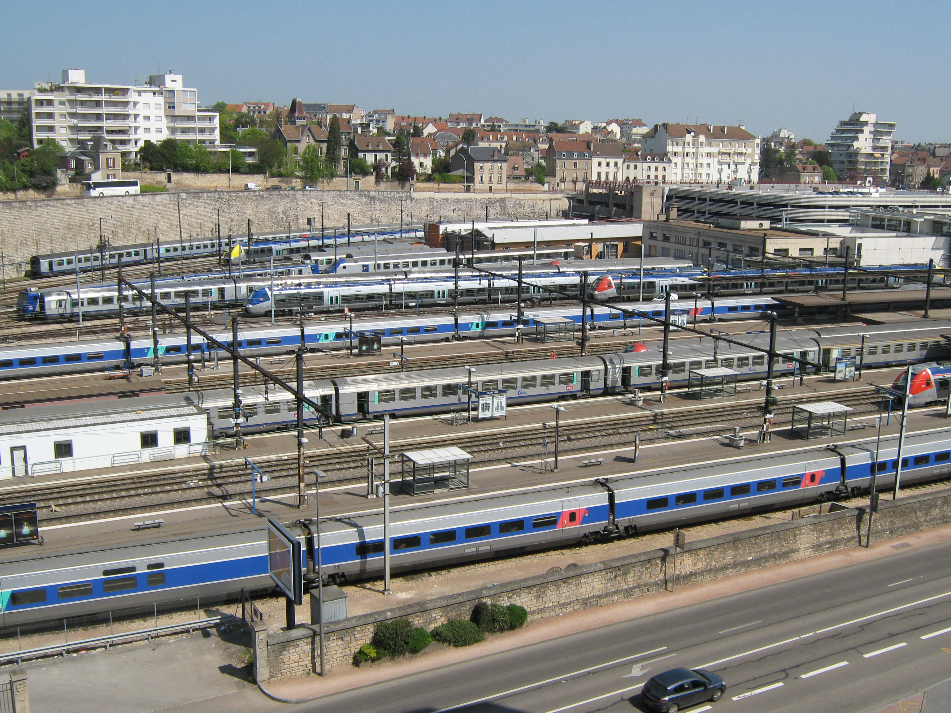 gare de Dijon